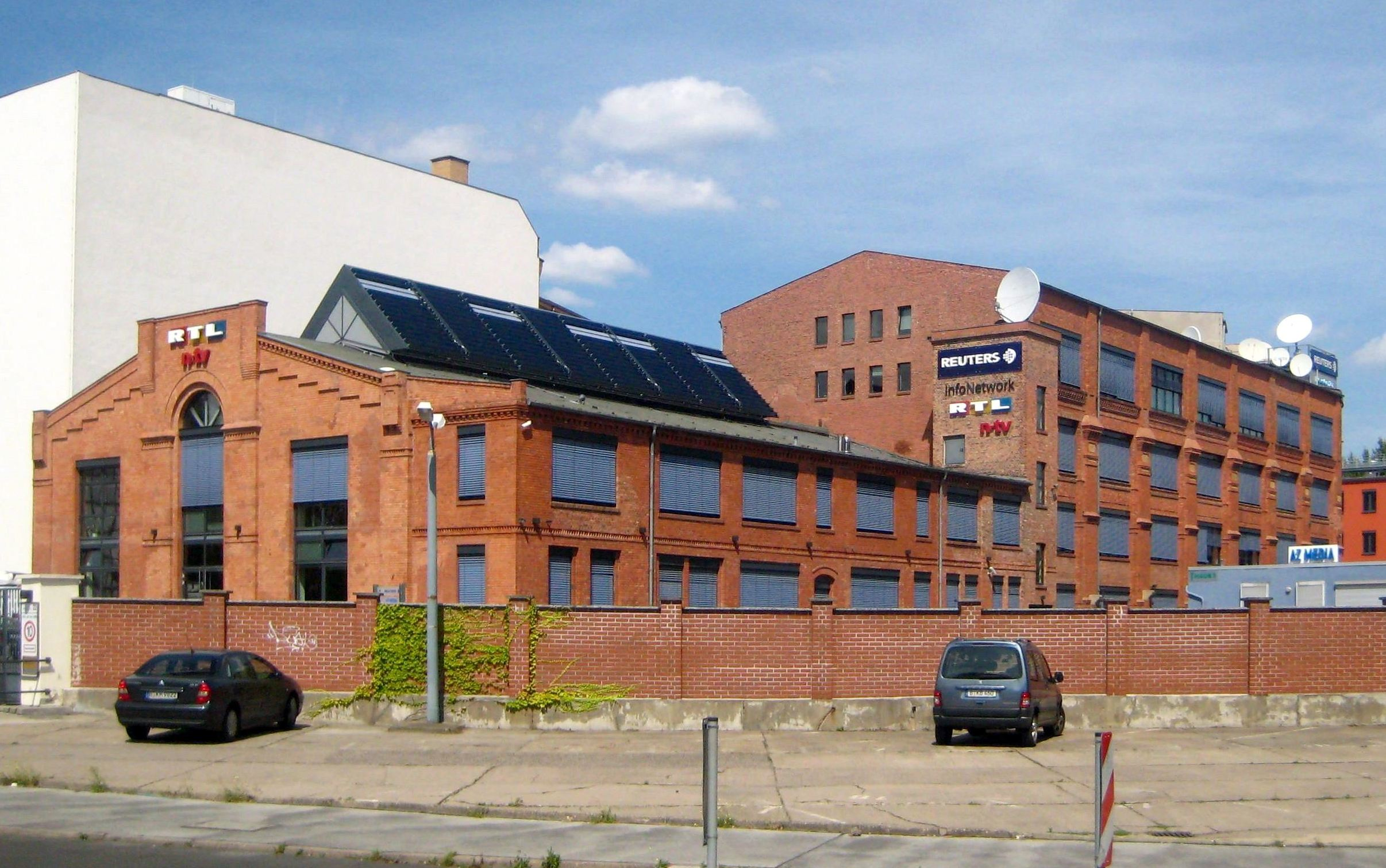 Das "News Center Schiffbauerdamm" am Schiffbauerdamm 22 in Berlin-Mitte, Sitz der Hauptstadtstudios der TV-Sender RTL und n-tv sowie der Berliner Redaktion der Nachrichtenagentur Reuters. Die historischen Gebäude gehörten früher zur 1889-1890 errichteten "Zentralstation IV" der Berliner Elektrizitätswerke (BEW), einem Tochterunternehmen der AEG. Das Blockkraftwerk diente zur Herstellung von Gleichstrom und musste daher in unmittelbarer Nähe zu den Endabnehmern in der Dorotheenstadt liegen. Nach der Umstellung auf Fernstromversorgung durch Drehstrom Anfang des 20. Jahrhunderts wurden die alten Zentralstationen zumeist abgerissen. Das Kesselhaus (vorn) und die Maschinenhalle (dahinter) auf dem Gelände am Schiffbauerdamm gehörten zu den wenigen Ausnahmen und stellen daher ein wichtiges Zeugnis der frühen Stromversorgung in Deutschland dar. Das zum Komplex gehörende Verwaltungsgebäude an der Luisenstraße 45 wurde 1927-1929 durch einen erhaltenen Neubau von Hans Müller im Stil der Neuen Sachlichkeit ersetzt. In der DDR-Zeit wurde die nahe der Sektorengrenze gelegene Anlage als Fernwäremstation sowie als Büro- und Werkstattgebäude genutzt. 1998 schloss der Bund als neuer Besitzer einen langjährigen Mietvertrag mit der Schiffbauerdamm Betreibergesellschaft mbH im Rahmen eines PPP - Modells ab. Mit den Mietern RTL und Reuters wurde das Gebäude bezogen. Die ehemaligen Kraftwerkbauten wurden nach Entwürfen des Architekten Jürgen Klemm sowie der Konzeption und Realisierung durch den Vertreter der Betreibergesellschaft, Herrn Dipl. Ing. Rainer Thorn, umgebaut. Das Vorderhaus an der Luisenstraße wird heute von der Verwaltung des Deutschen Bundestages genutzt. Die drei historischen Bauten auf dem Gelände sind gemeinsam als Baudenkmal gelistet.